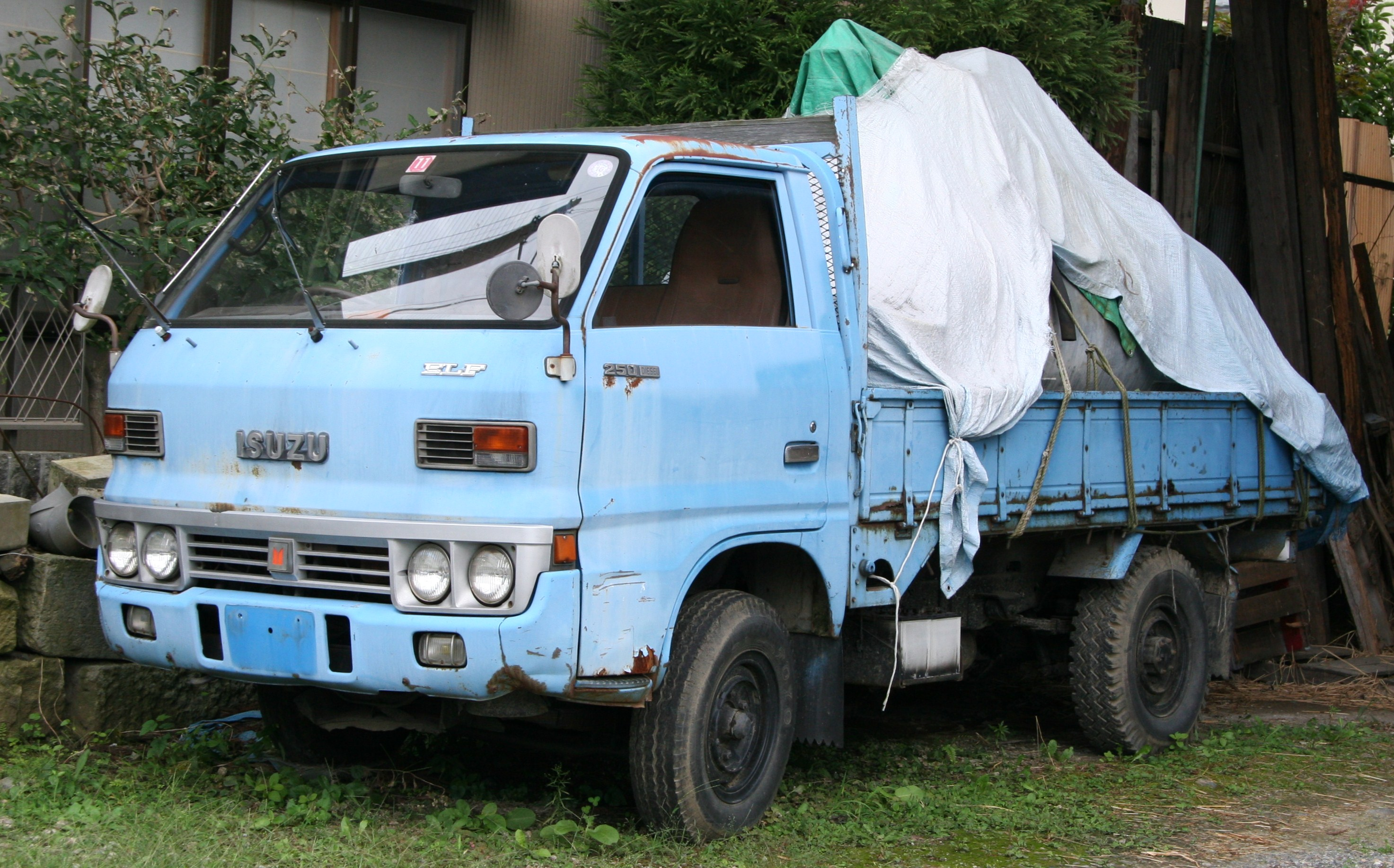 Isuzu Elf